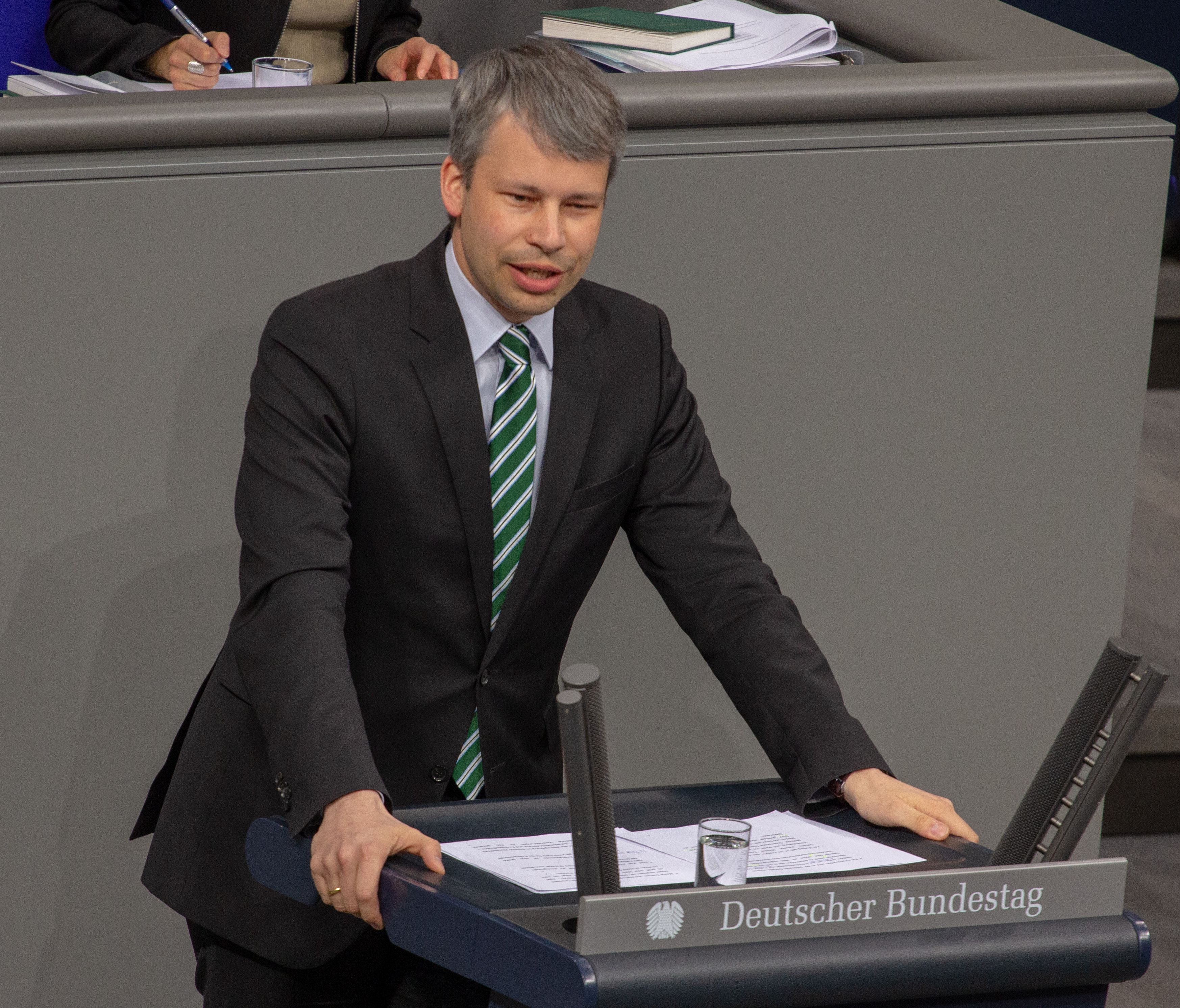 Steffen Bilger am 11. April 2019 im Deutschen Bundestag.